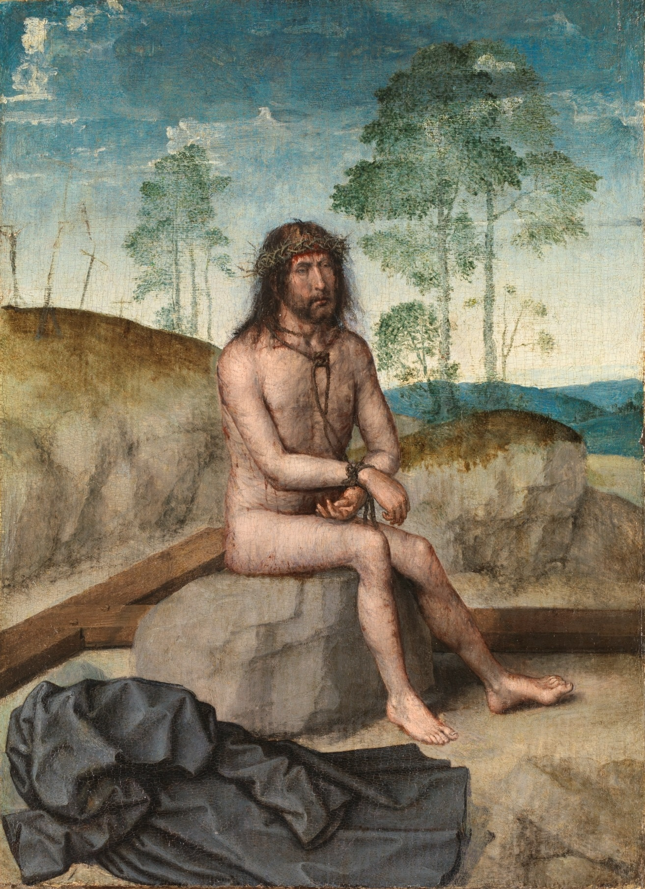 La obra representa a Jesucristo sentado, esperando la muerte en el Gólgota, junto a la cruz vacía y las vestiduras de que le han despojado los sayones. Es el tema iconográfico conocido como Cristo sobre la piedra fría (confundido en ocasiones con el Ecce Homo, en el que Cristo está junto a Pilatos a las puertas del Pretorio), más empleado en la escultura que en la pintura, donde casi resulta excepcional. Éste es uno de los primeros ejemplos conocidos en pintura, lo que demuestra una vez más la originalidad de su autor al traducir los temas sacros.